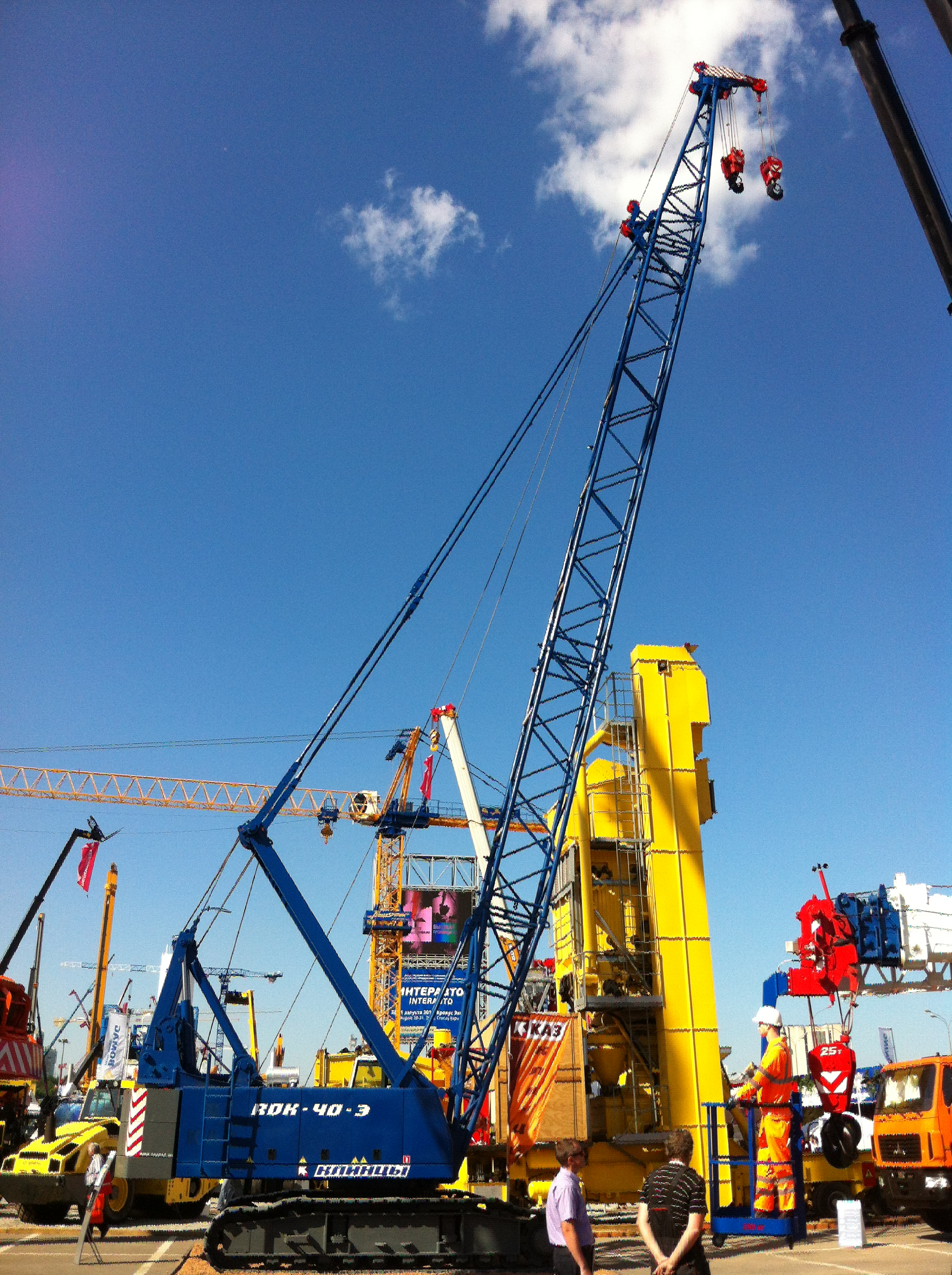 RDK-40Э на выставке СТТ-2013 в г. Москва